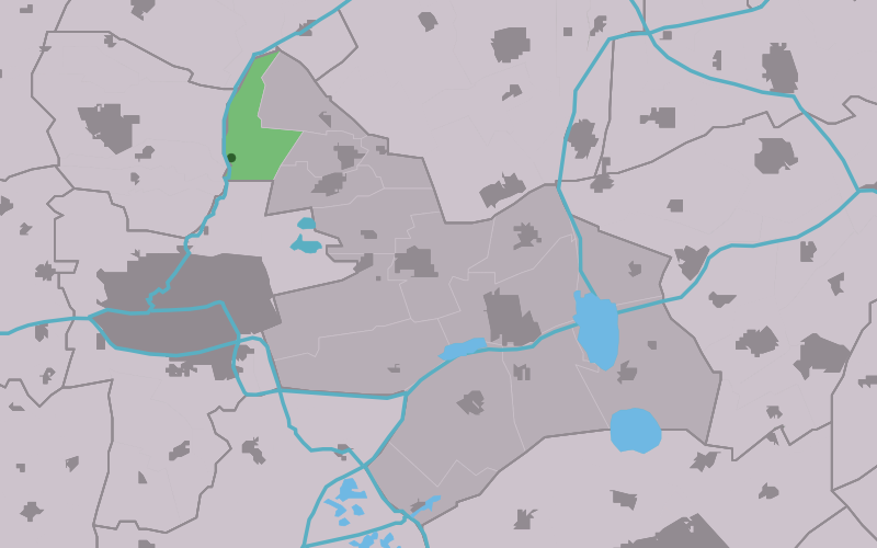 Kaartsje fan himrik fan Wyns